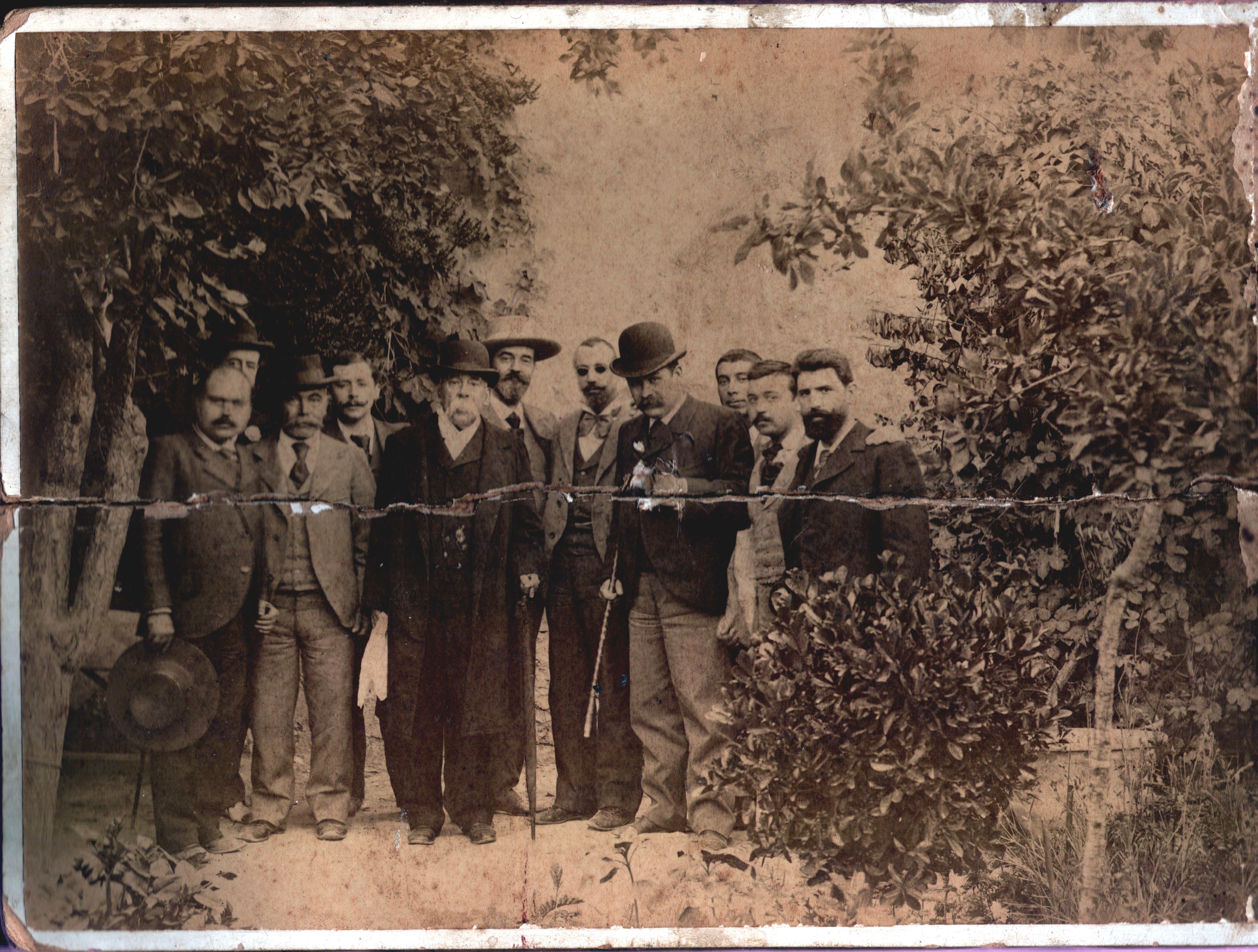 Jose Garcia-Vaso y Vicente Medina (poeta y pintor, con bigote blanco)